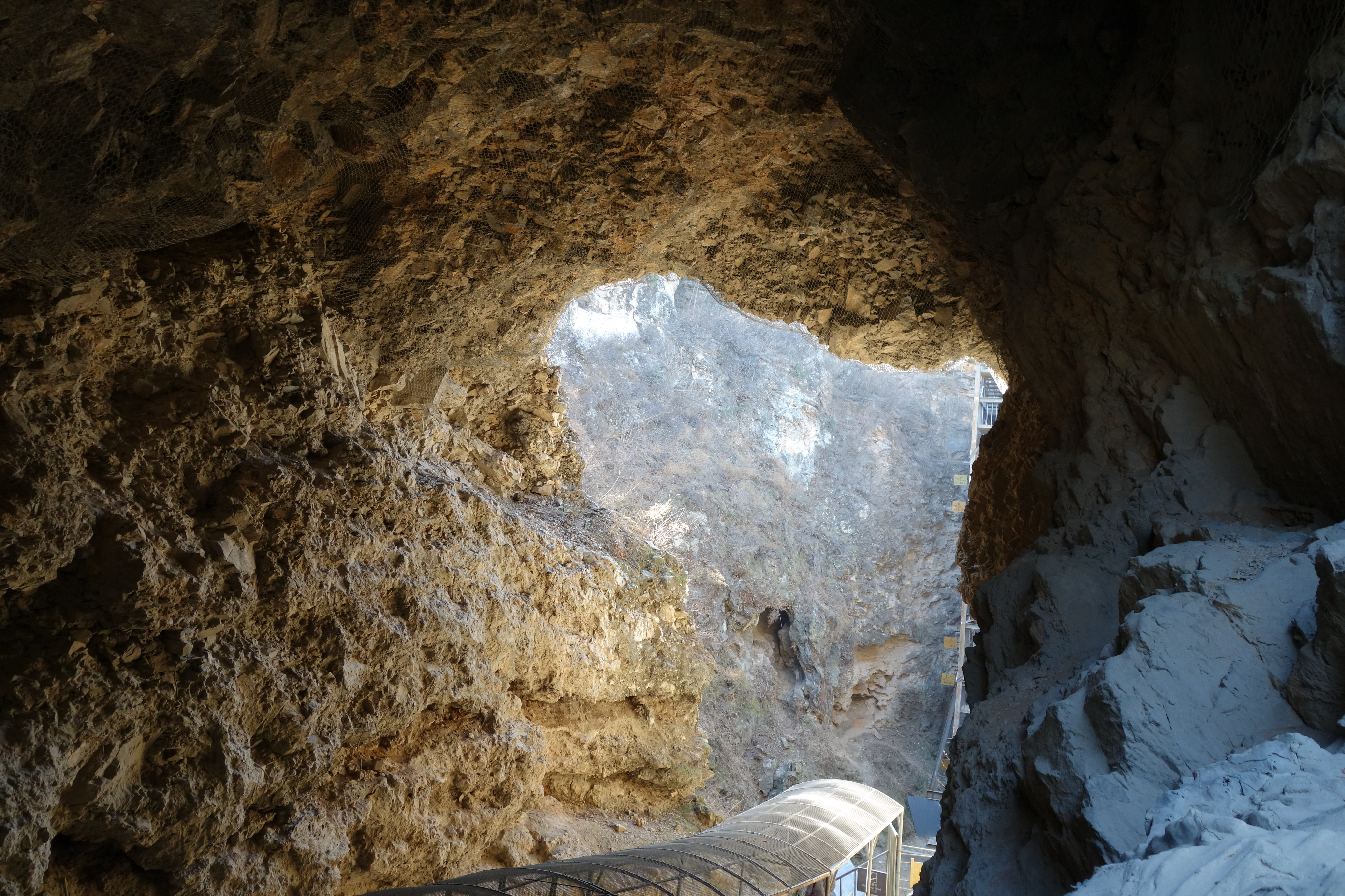 北京猿人遗址“鸽子堂”内部